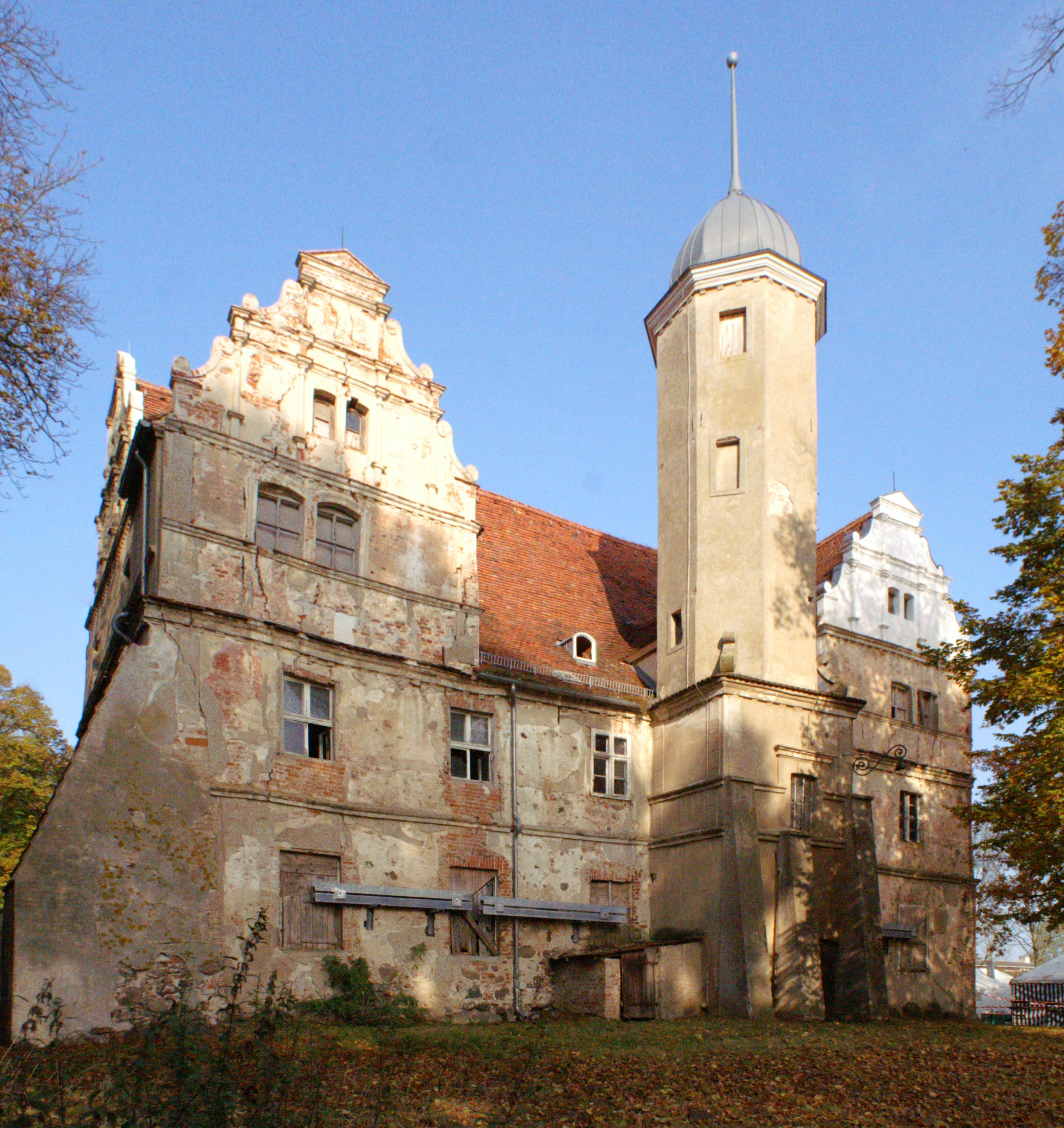 Wasserschloss Quilow - in Quilow, Landkreis Ostvorpommern, vormalige Eigentümer "von Ploetz" (Pommern)